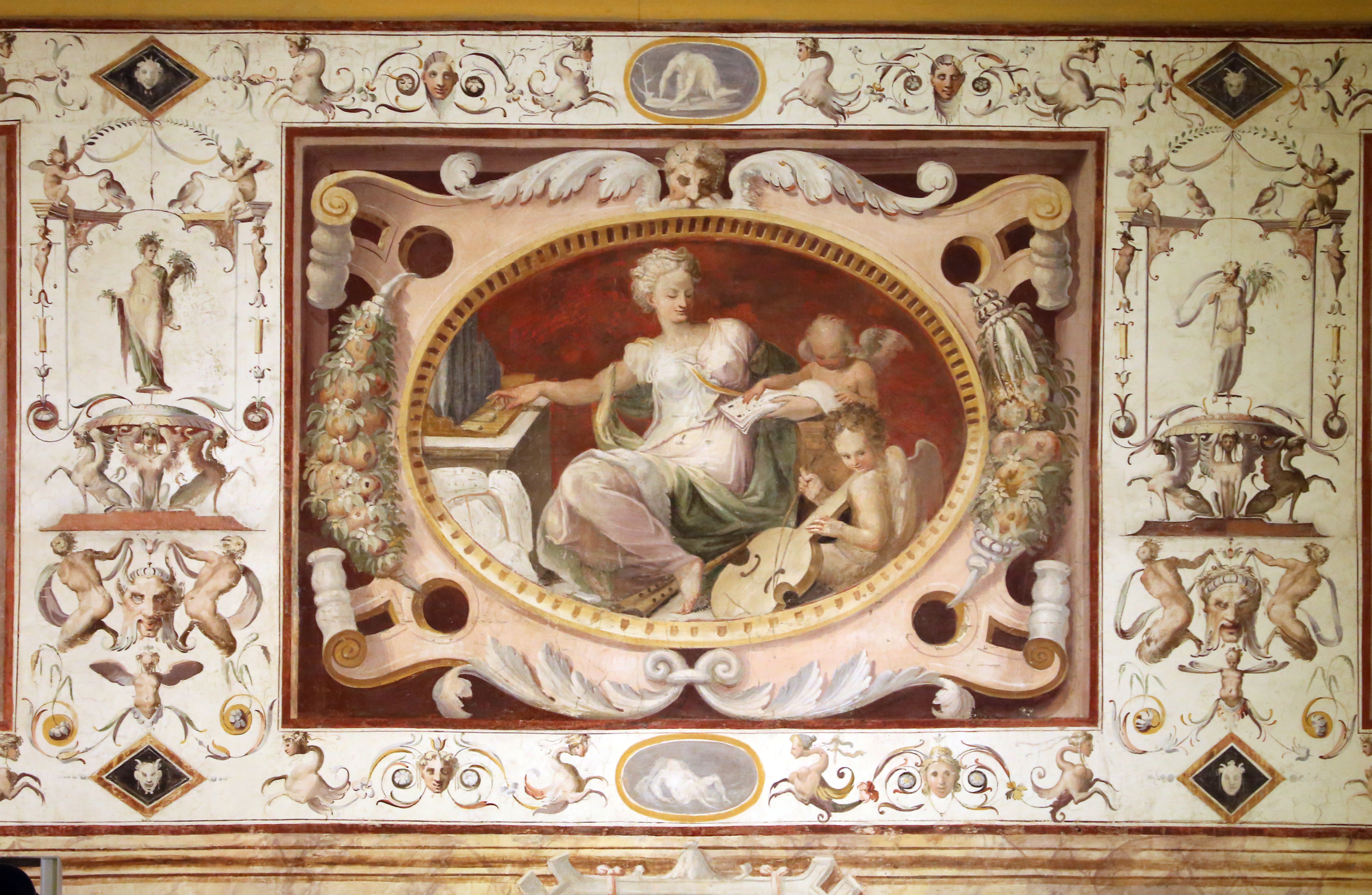 Villa Giulia (Rome) This is a photo of a monument which is part of cultural heritage of Italy.